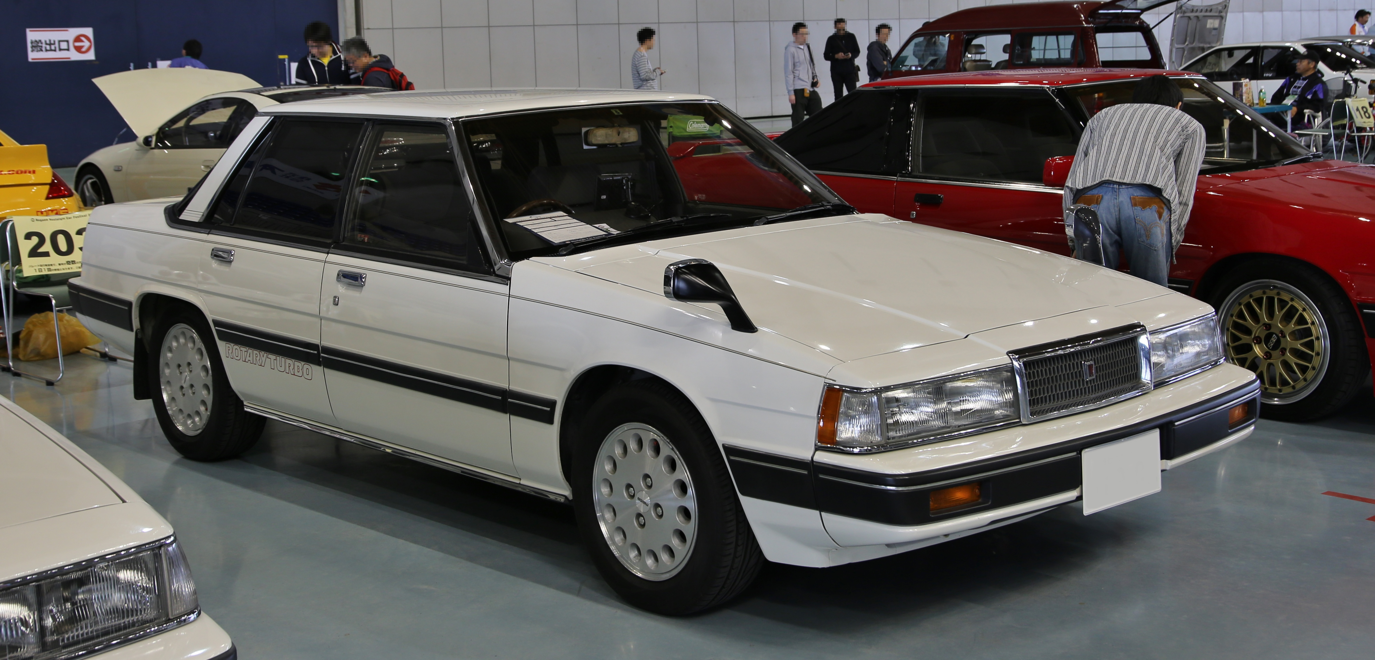 Mazda Cosmo